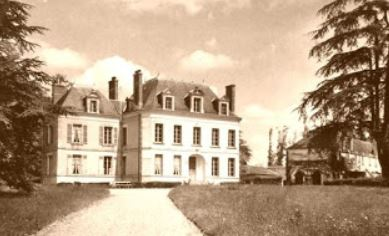 Ancienne carte postale représentant le château du Plessis, à Nouans-les-Fontaines.